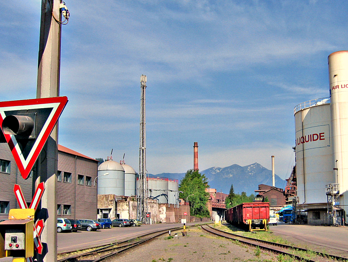 Hüttenwerk Donawitz mit Reiting